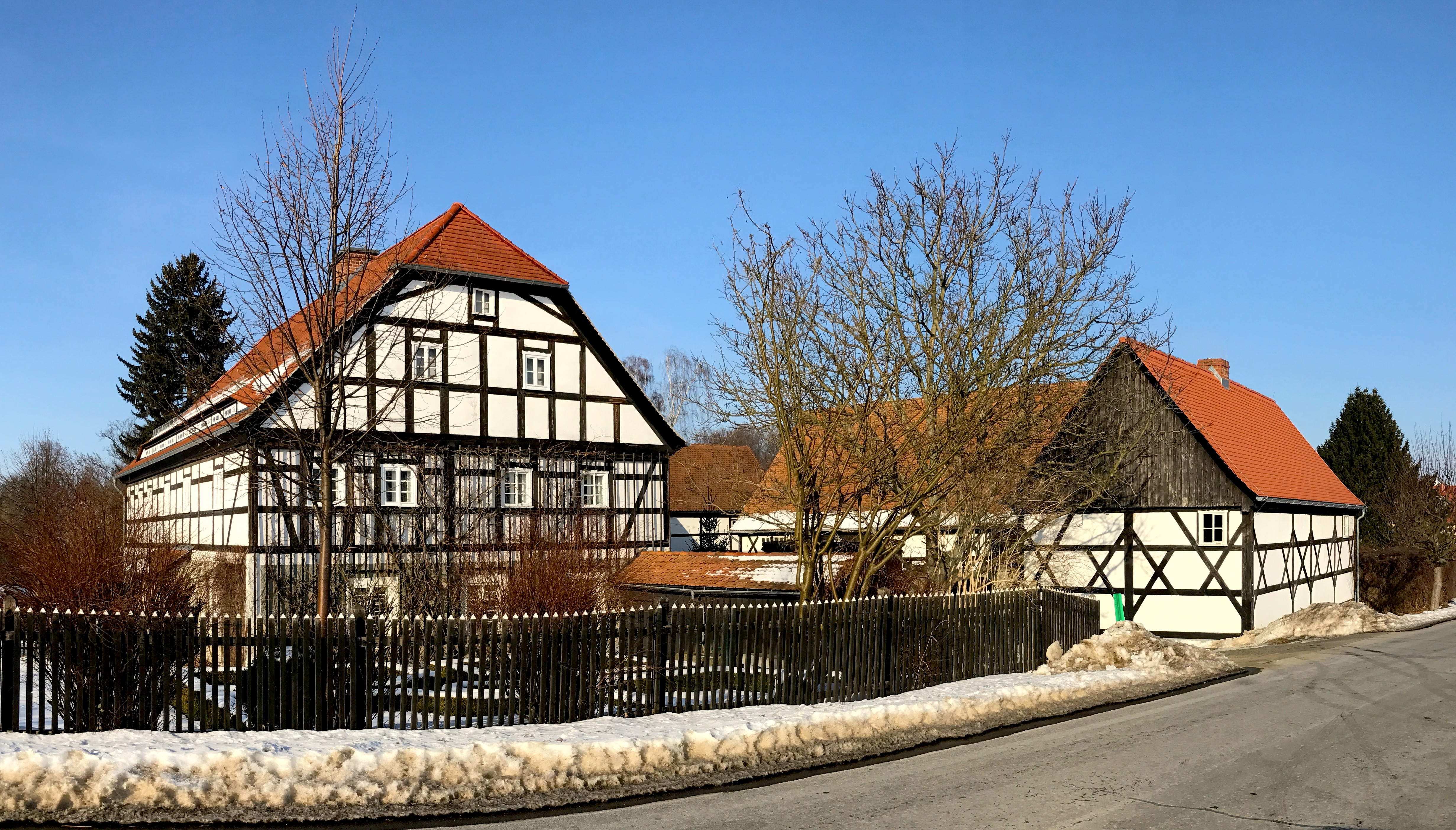 Dorfmuseum Markersdorf